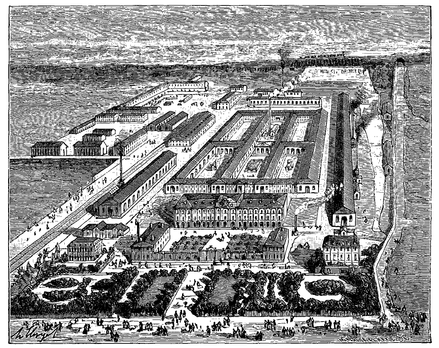 extrait de La France illustrée, géographie, histoire, administration, statistique, etc., tome I, par V.-A. Malte-Brun.